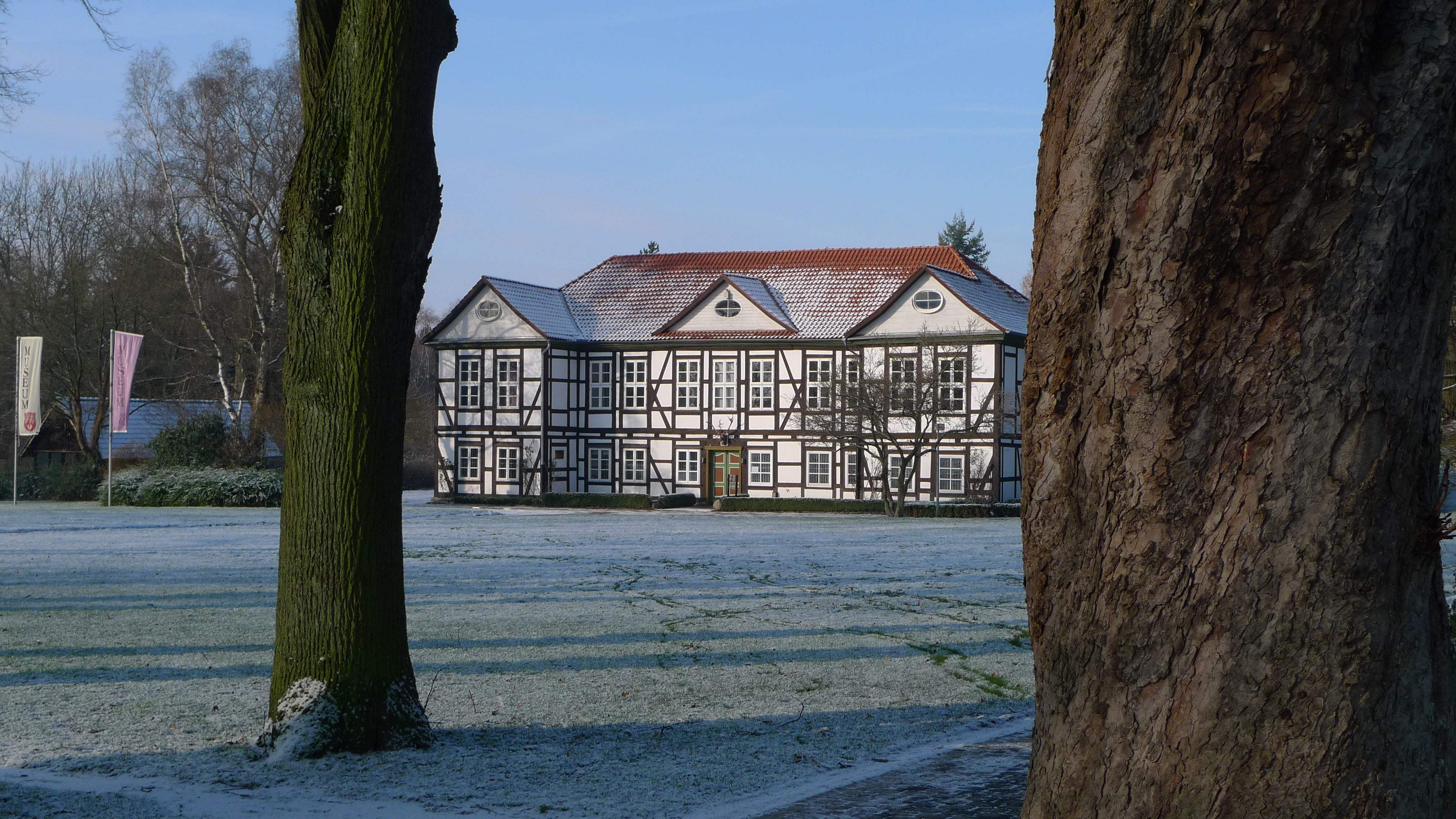 Frontseite des Städtischen Museums Seesen